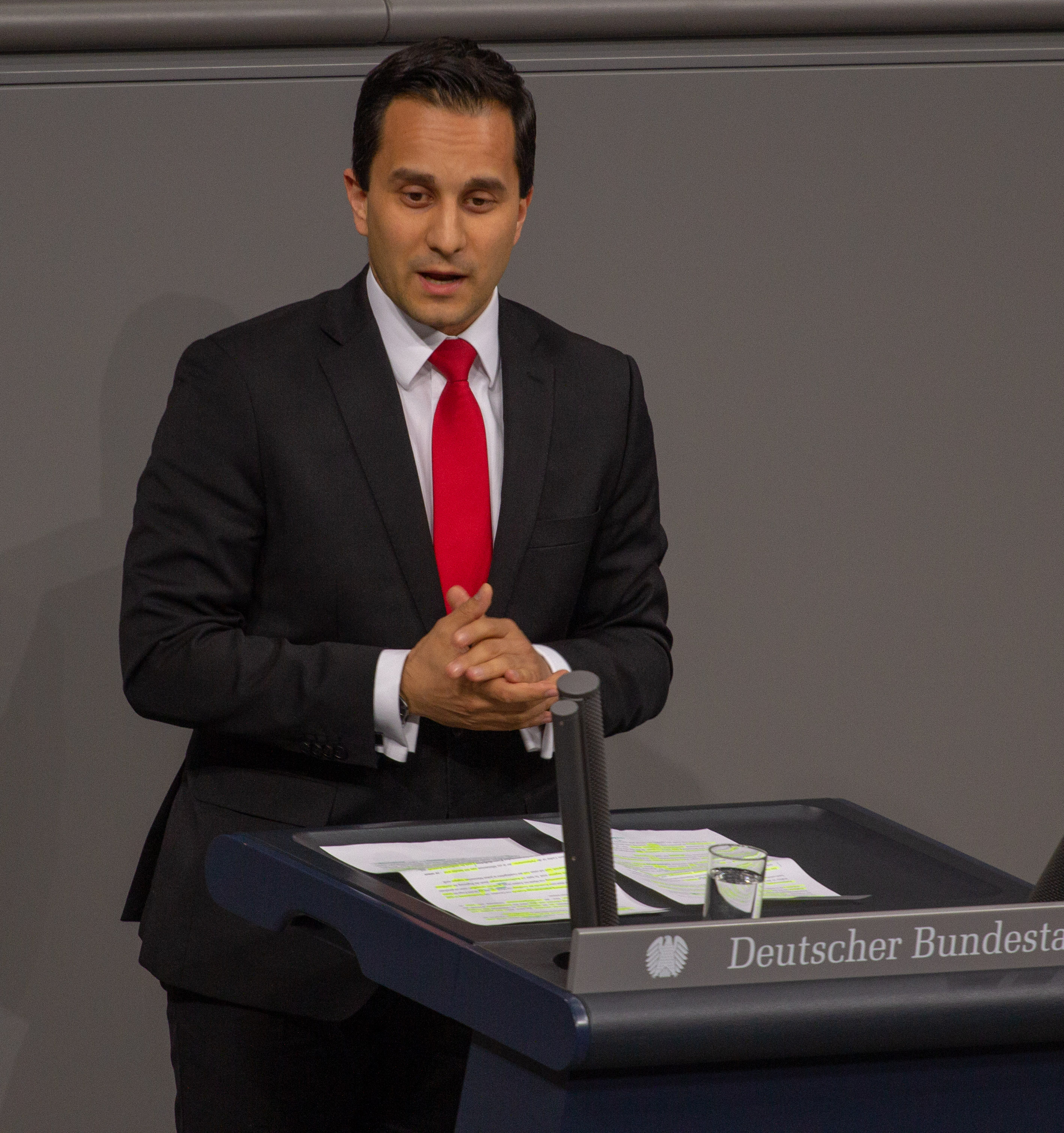 Mahmut Özdemir, Mitglied des Deutschen Bundestages, während einer Plenarsitzung am 11. April 2019 in Berlin.